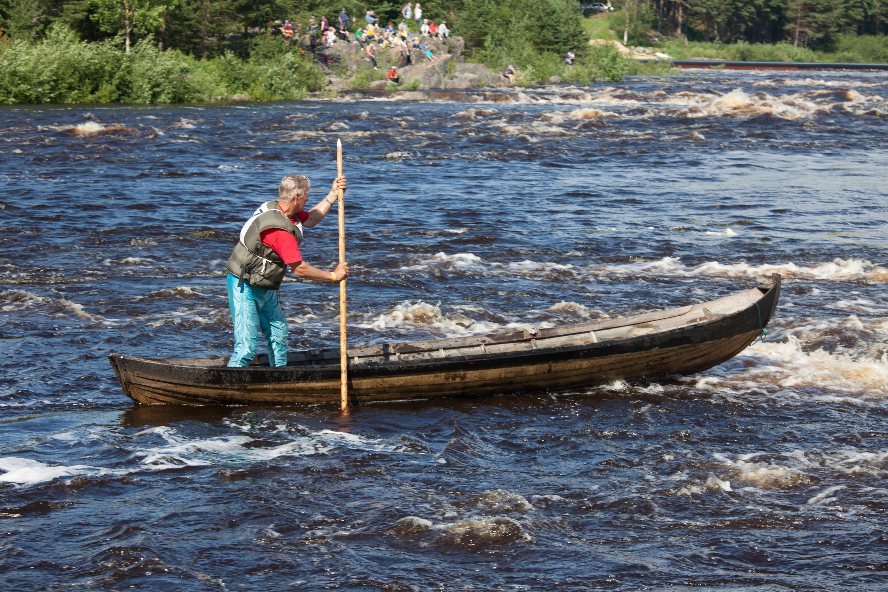 Iin tukkilaiskisat, sauvonta